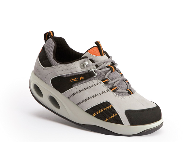 Produktaufnahme